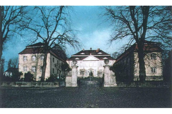 Haus Rethmar Ursprüngliche Einfahrt